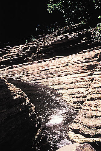 Couches de roches sédimentaires du parc.